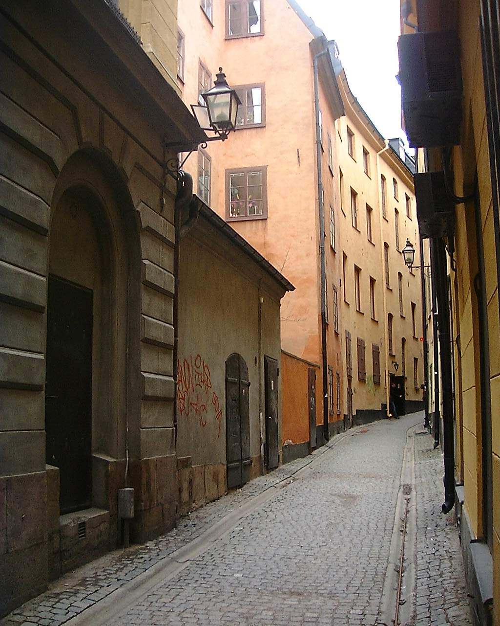 Helga Lekamens Gränd, Gamla stan, Stockholm